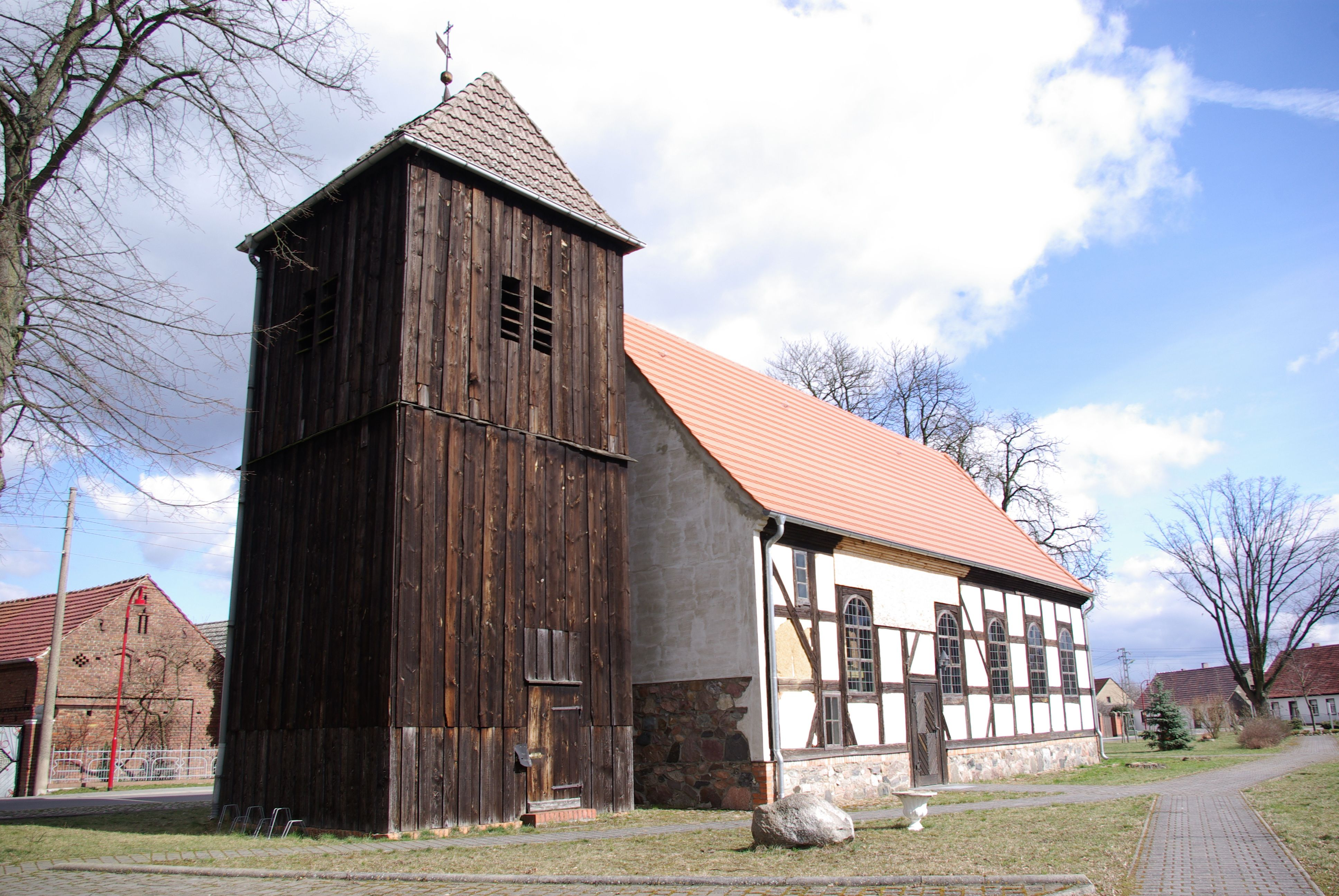 Rietzneuendorf-Staakow Ortsteil Rietzneuendorf in Brandenburg. Die Kirche steht unter Denkmalschutz.